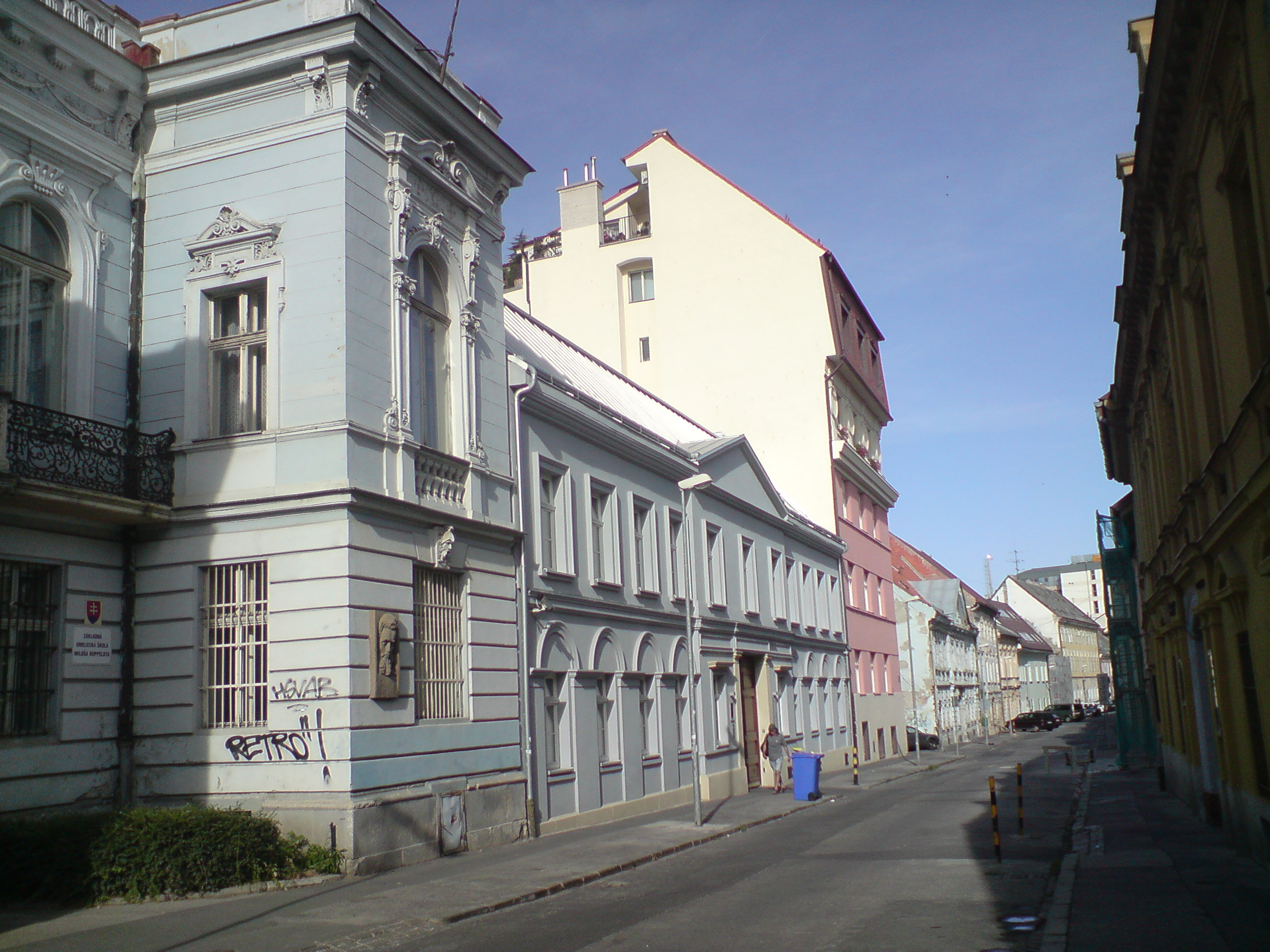 Georgievitsov palác, Panenská, Bratislava